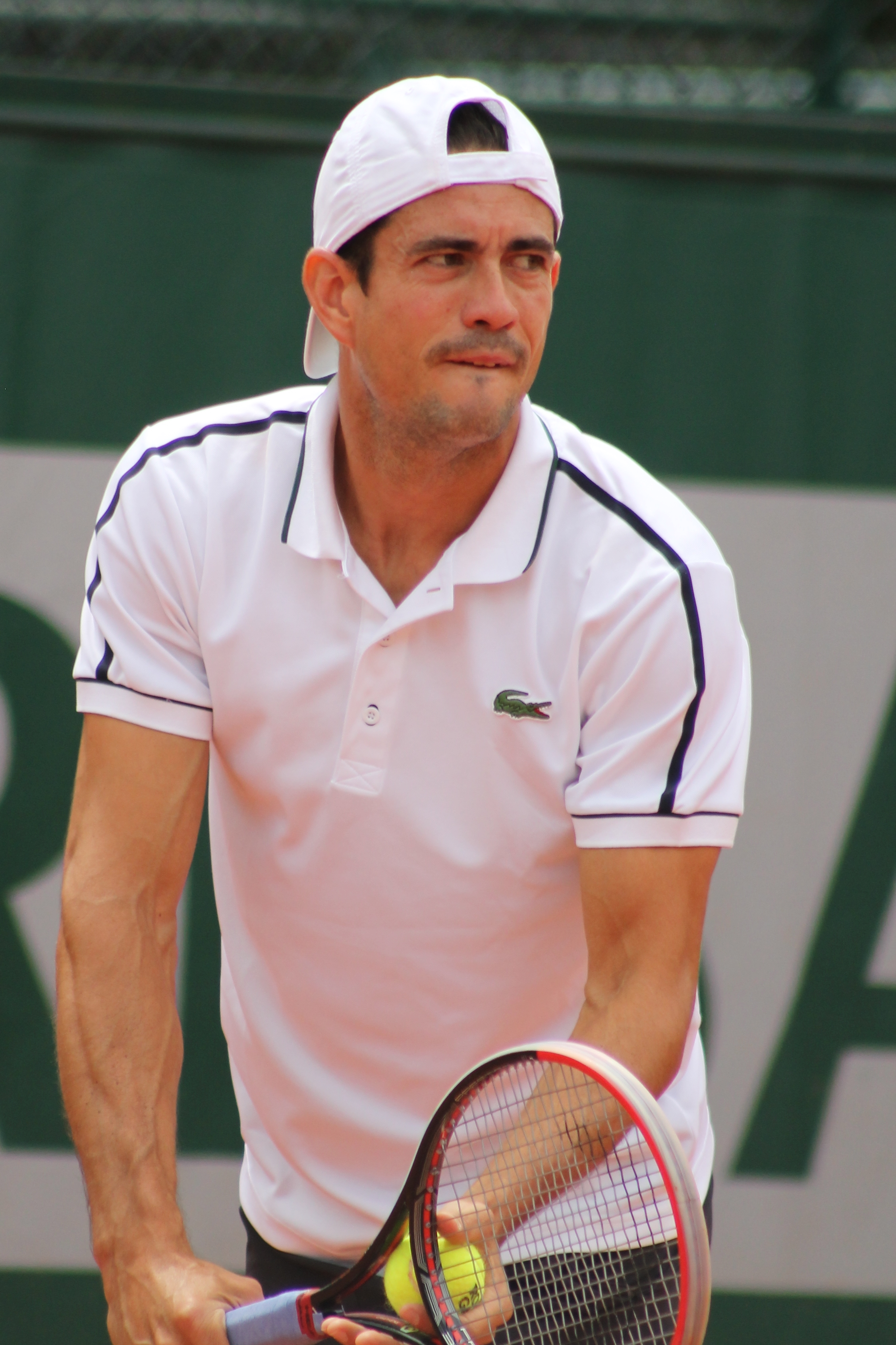 Garcia Lopez RG15